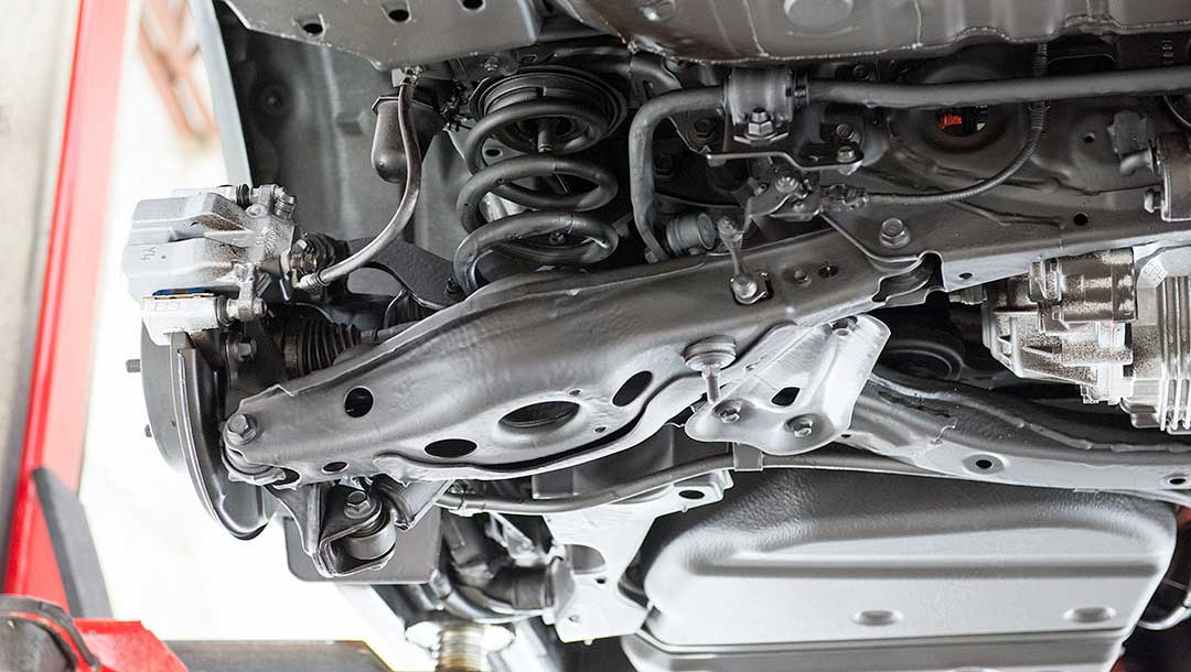 Tectyl på bil